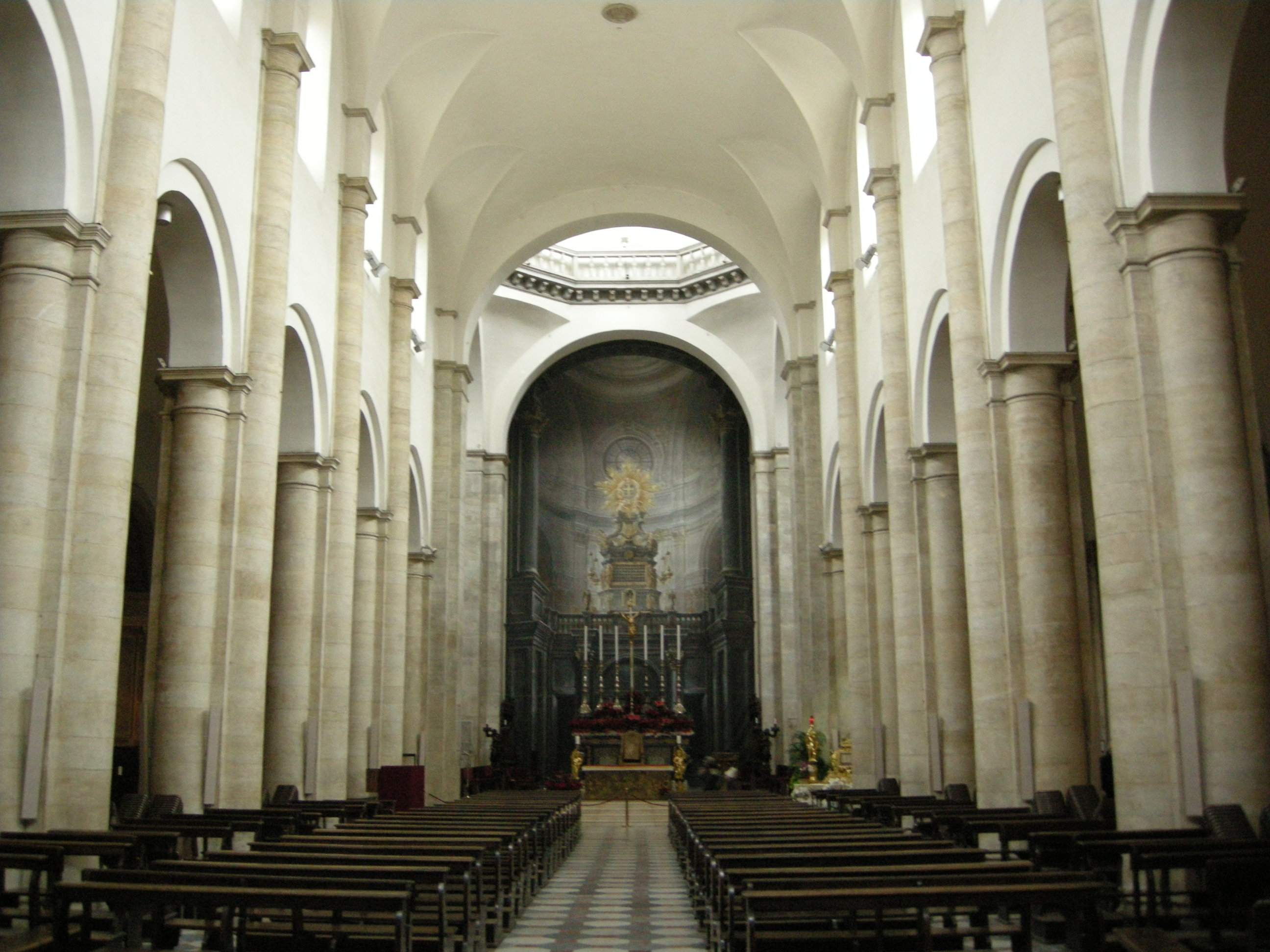 Torino, duomo, interno